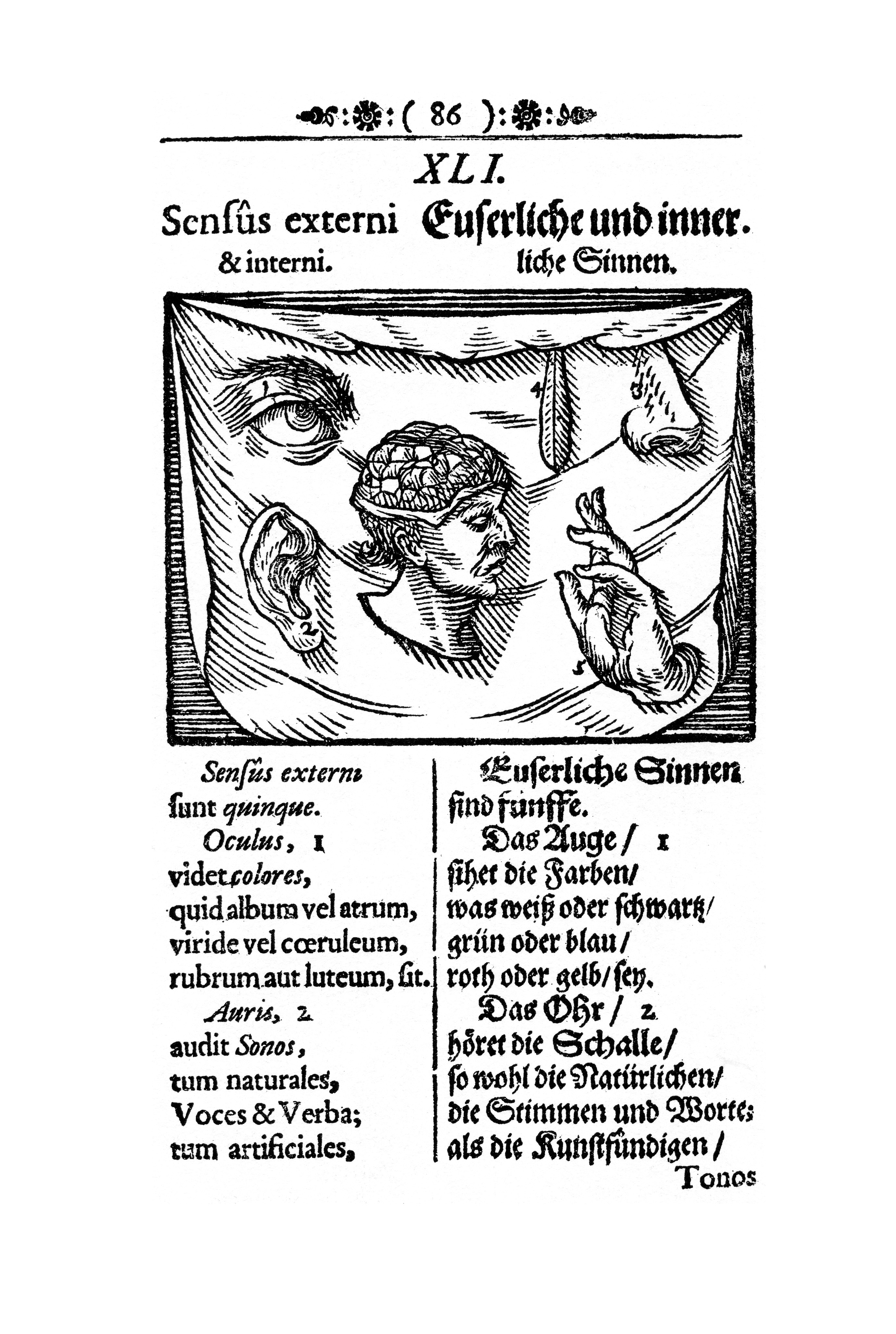 Orbis sensualium pictus